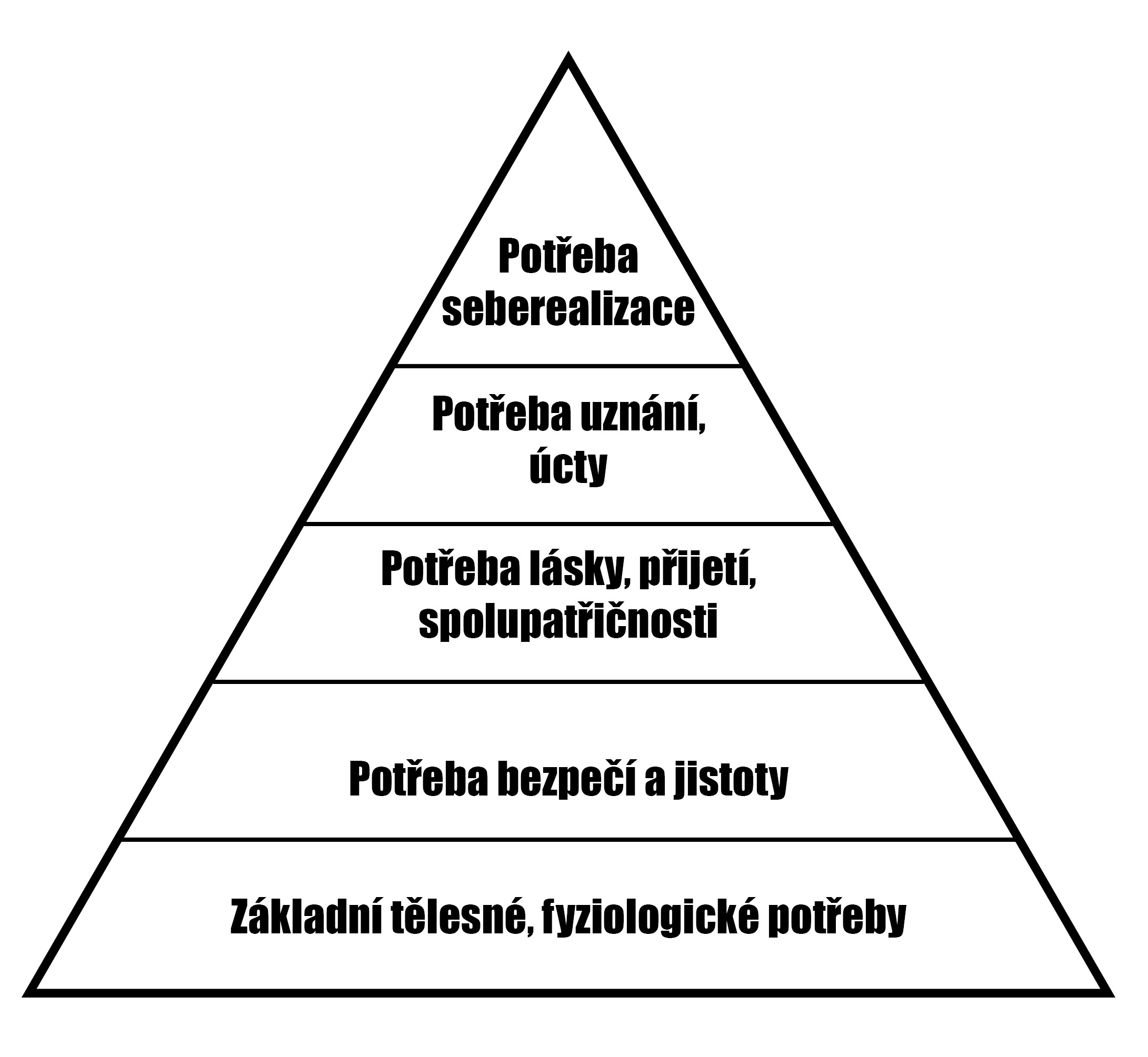 Maslowova pyramida (potřeb) je hierarchie lidských potřeb, kterou definoval americký psycholog Abraham Harold Maslow v roce 1943.